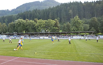 Panoramaaufnahme Alpenstadion Waidhofen/Ybbs